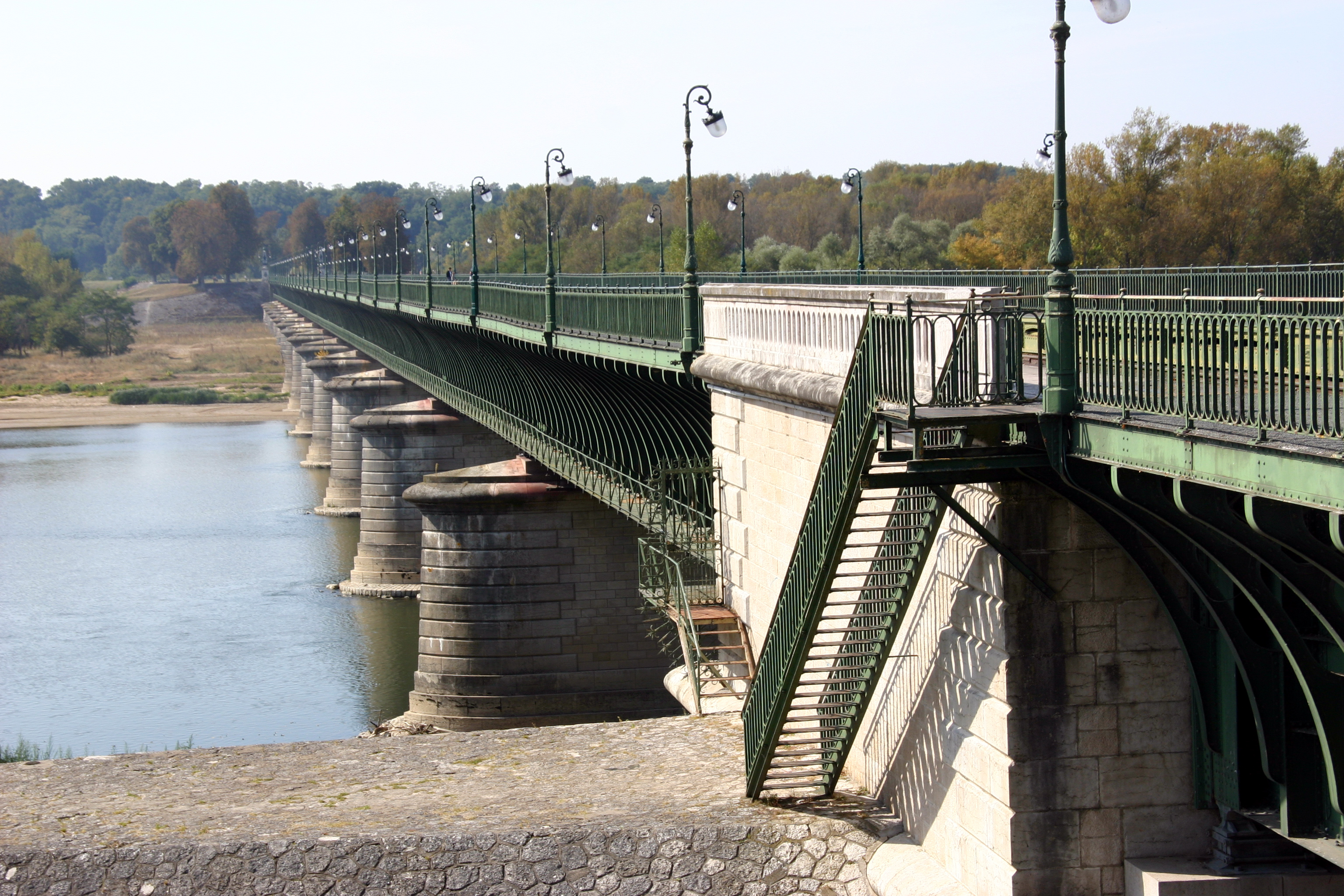 Kanalbrücke Briare; auf ihr quert der Canal latéral à la Loire den tiefer gelegenen Fluss Loire.